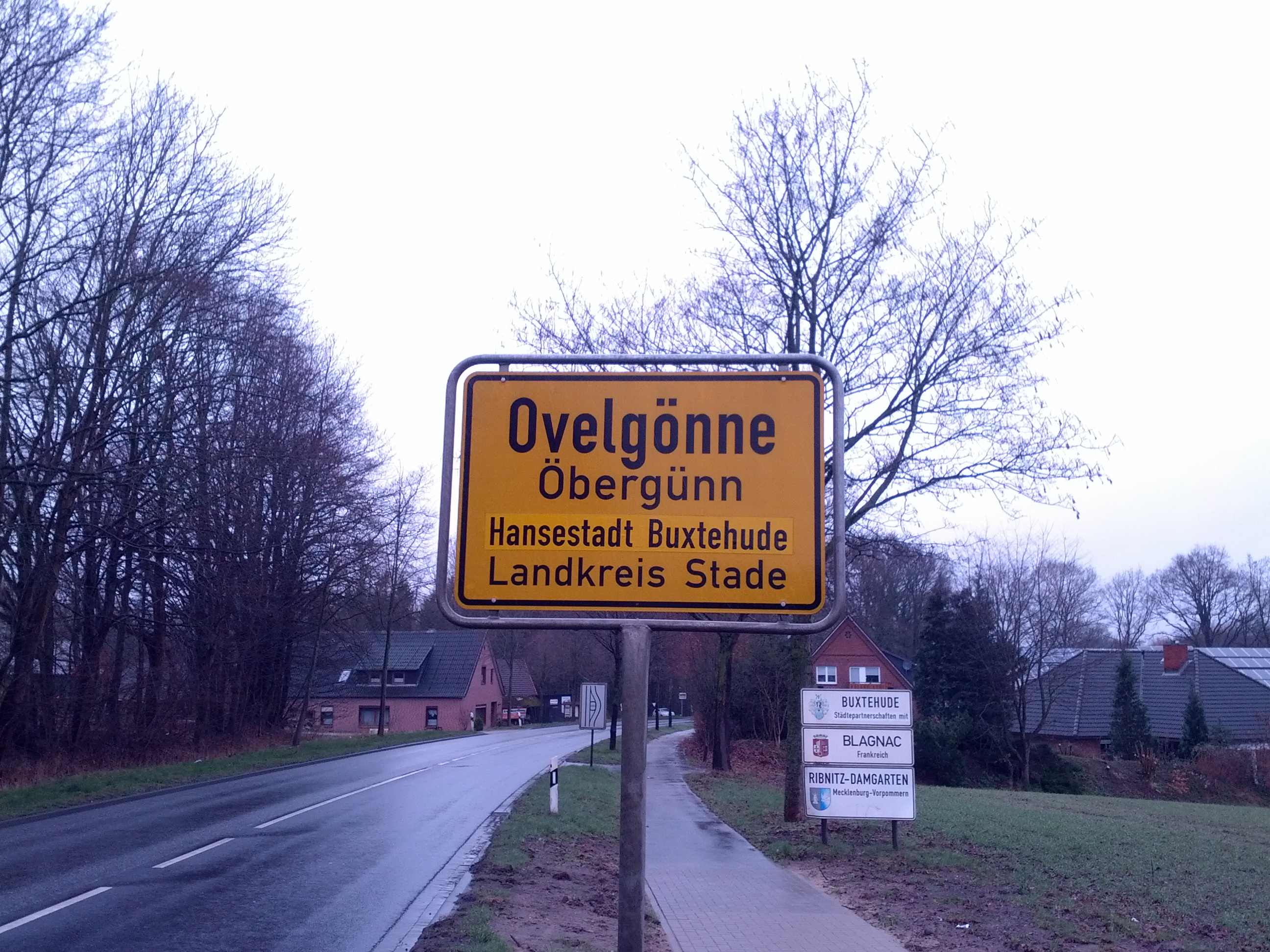 Oortsschild mit den Naam op Hoochdüütsch un op Plattdüütsch